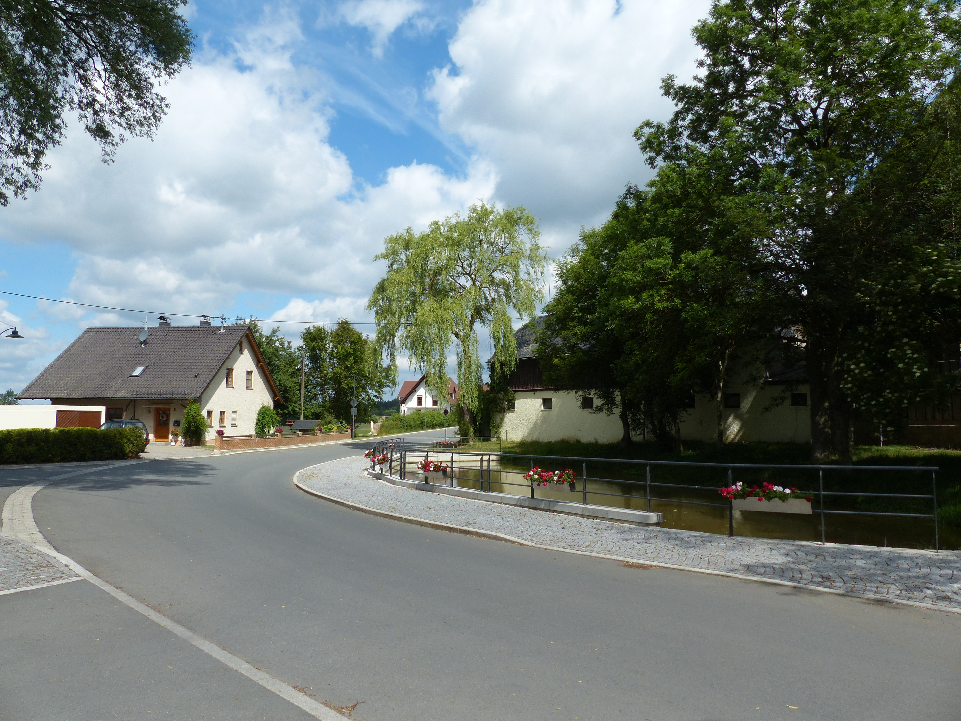 Völkenreuth, Ortsteil von Schwarzenbach an der Saale